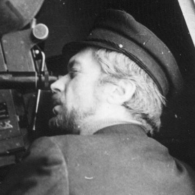 Mircea Mureșan.